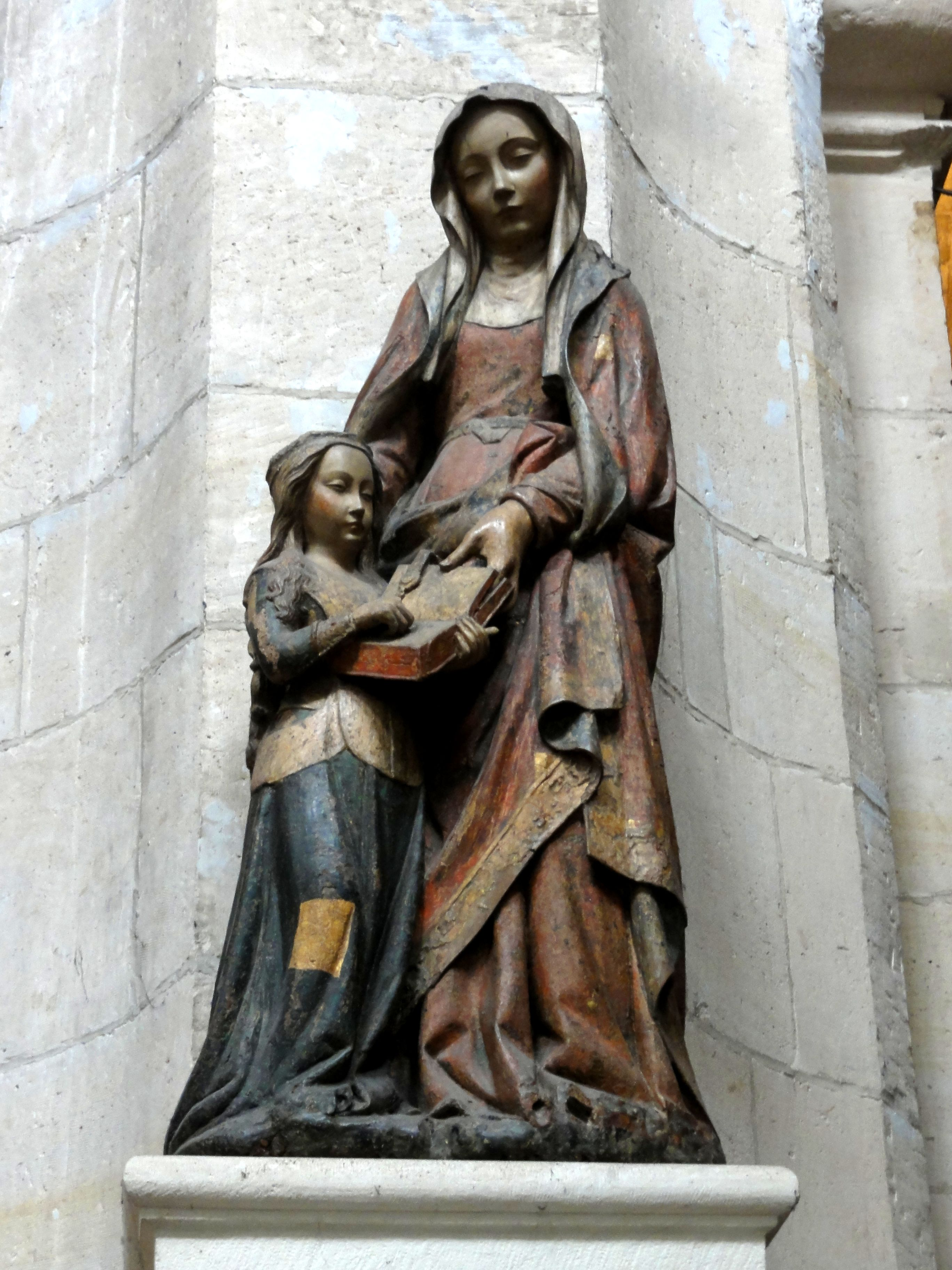 Groupe sculpté : Éducation de la Vierge par sainte Anne.